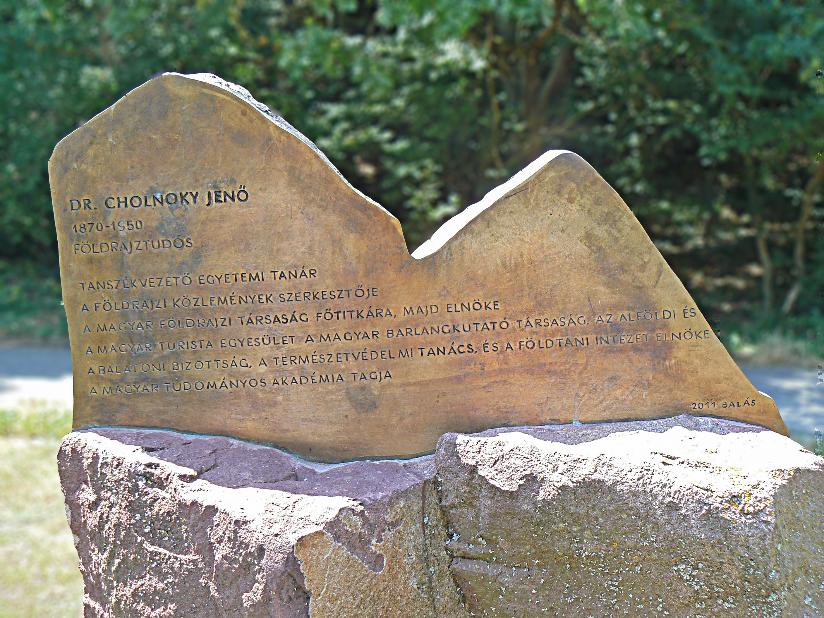 A felvétel 2013. augusztus 6 -án készült Balatonfüreden. Dr.Cholnoky Jenő (1870 - 1950) földrajztudós emlékműve. ©© Derzsi Elekes Andor, Budapest, 2013, You are authorised to use these photos and vids under Creative Commons – even for commercial, for profit purposes. Photos must be attributed to Derzsi Elekes Andor. All of the photos and vids in the Metapolisz DVD line are under Creative Commons and can be used even for commercial – for profit – purposes. Recommended Citation Derzsi Elekes Andor: Metapolisz DVD line